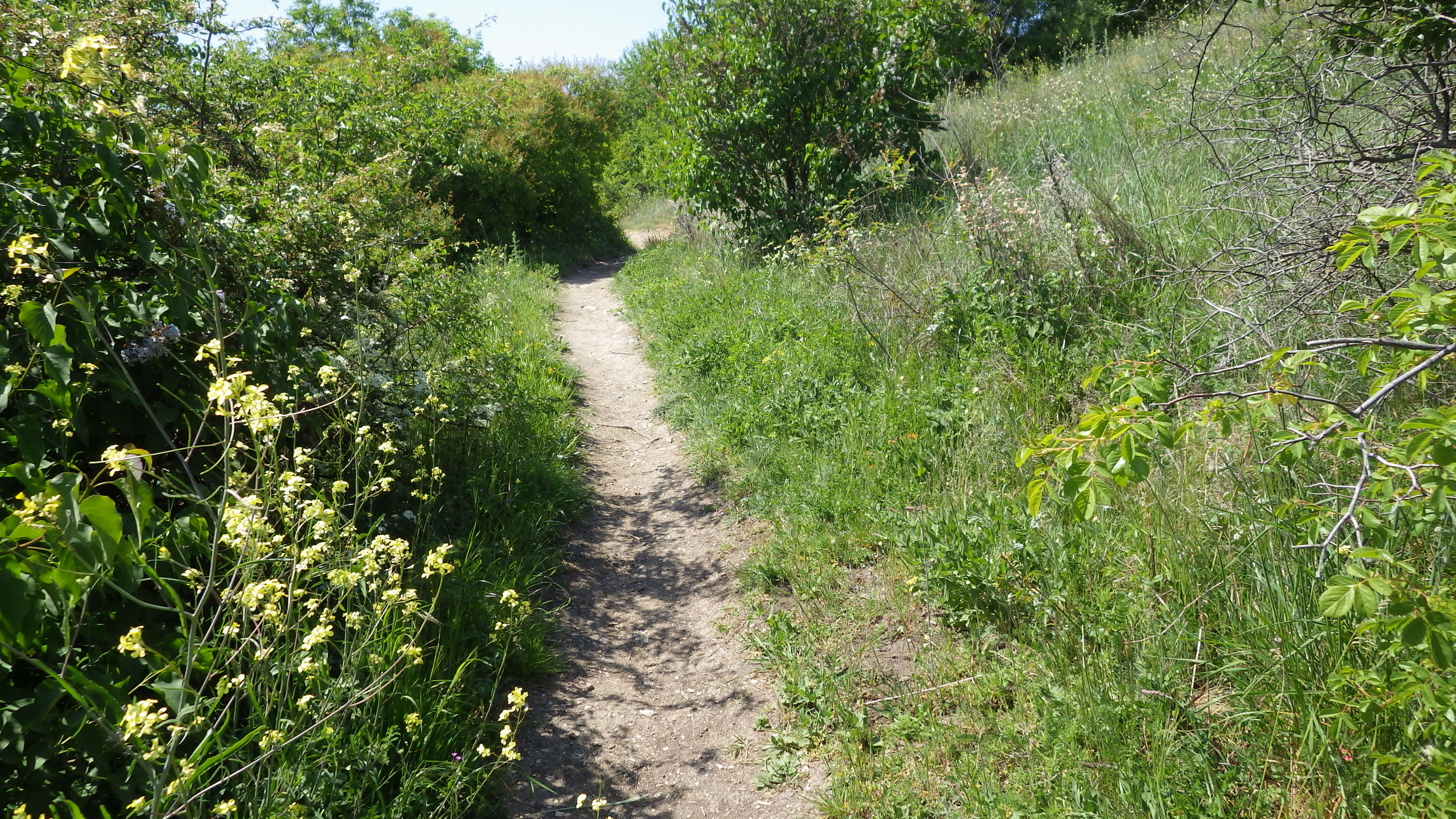 Weg zu den Einsiedlerhöhlen am Hang des Óvár-Berges